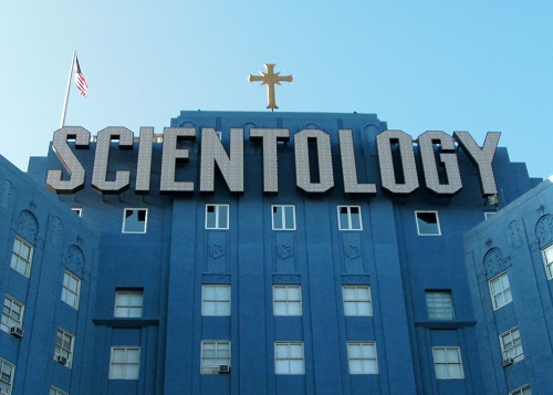 fachada de la iglesia de la cienciología